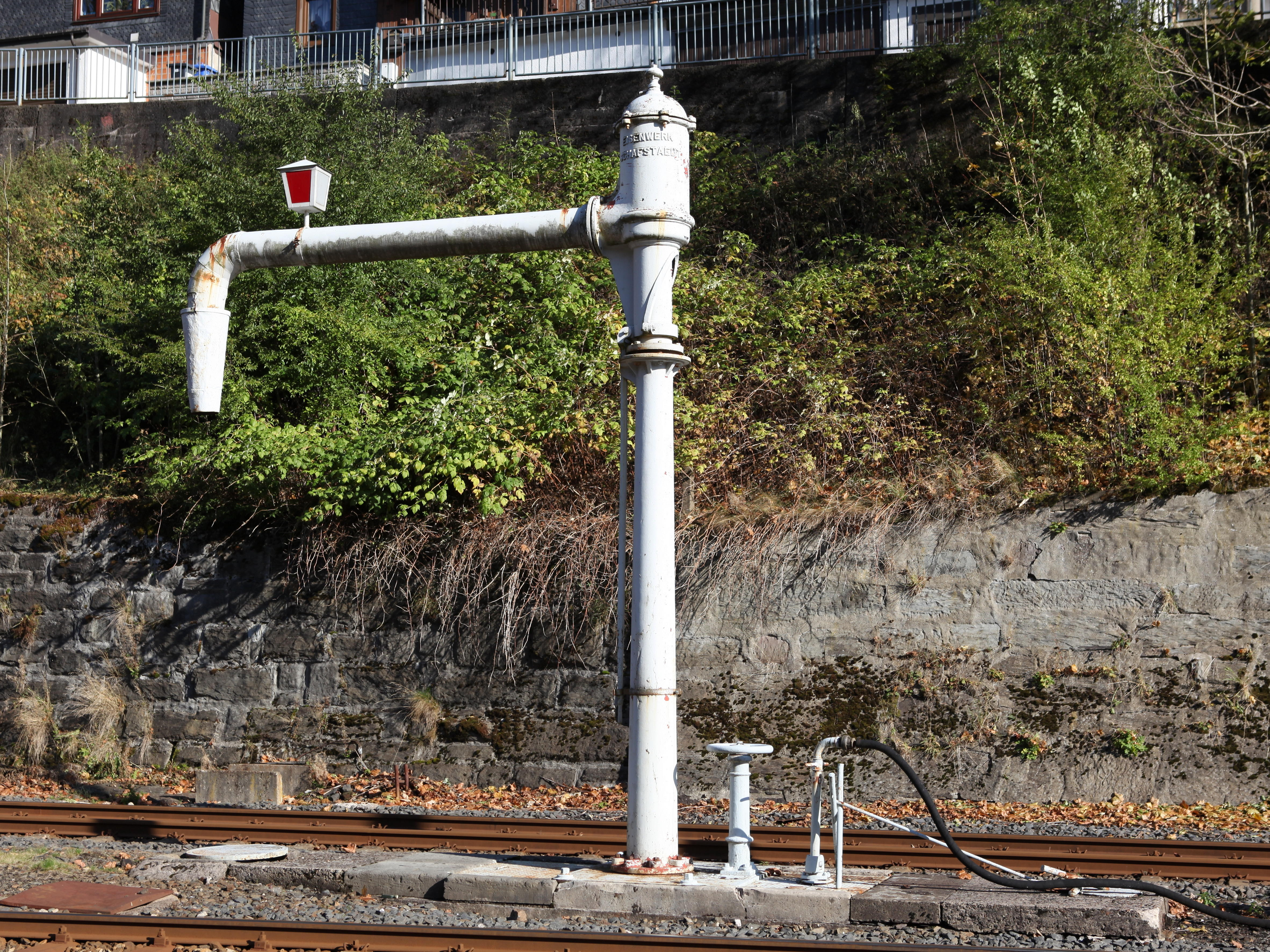 Wasserkran, Bahnhof Lauscha, Bahnhofstraße 31